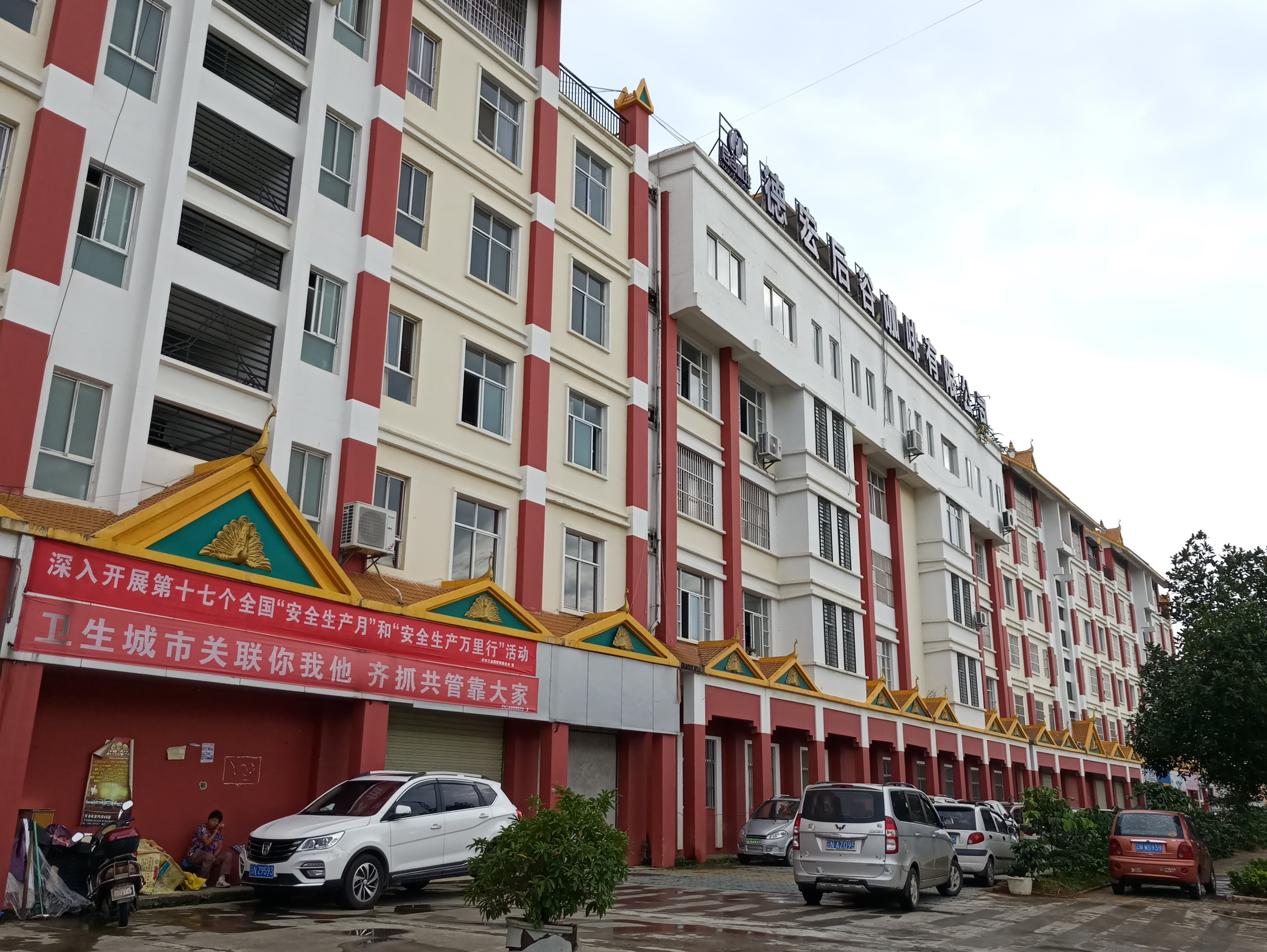 芒市后谷咖啡